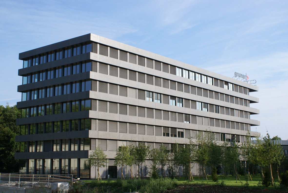 Citygate in Basel, Schweiz